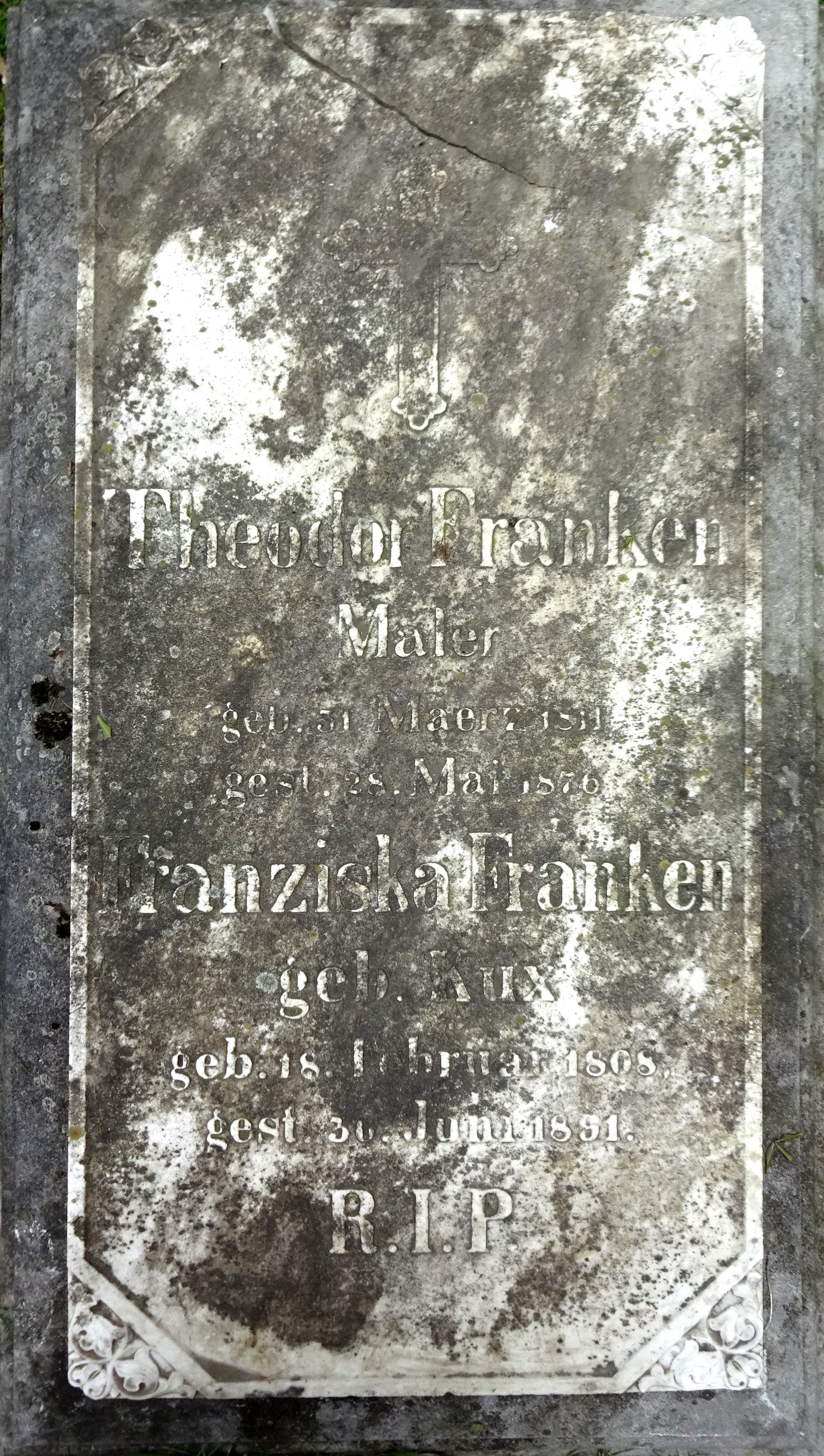 Grabstein Theodor Franken Maler (1811–1876) und Franziska Franken geb. Kux (1808–1891), Golzheimer Friedhof, nördlicher Teil